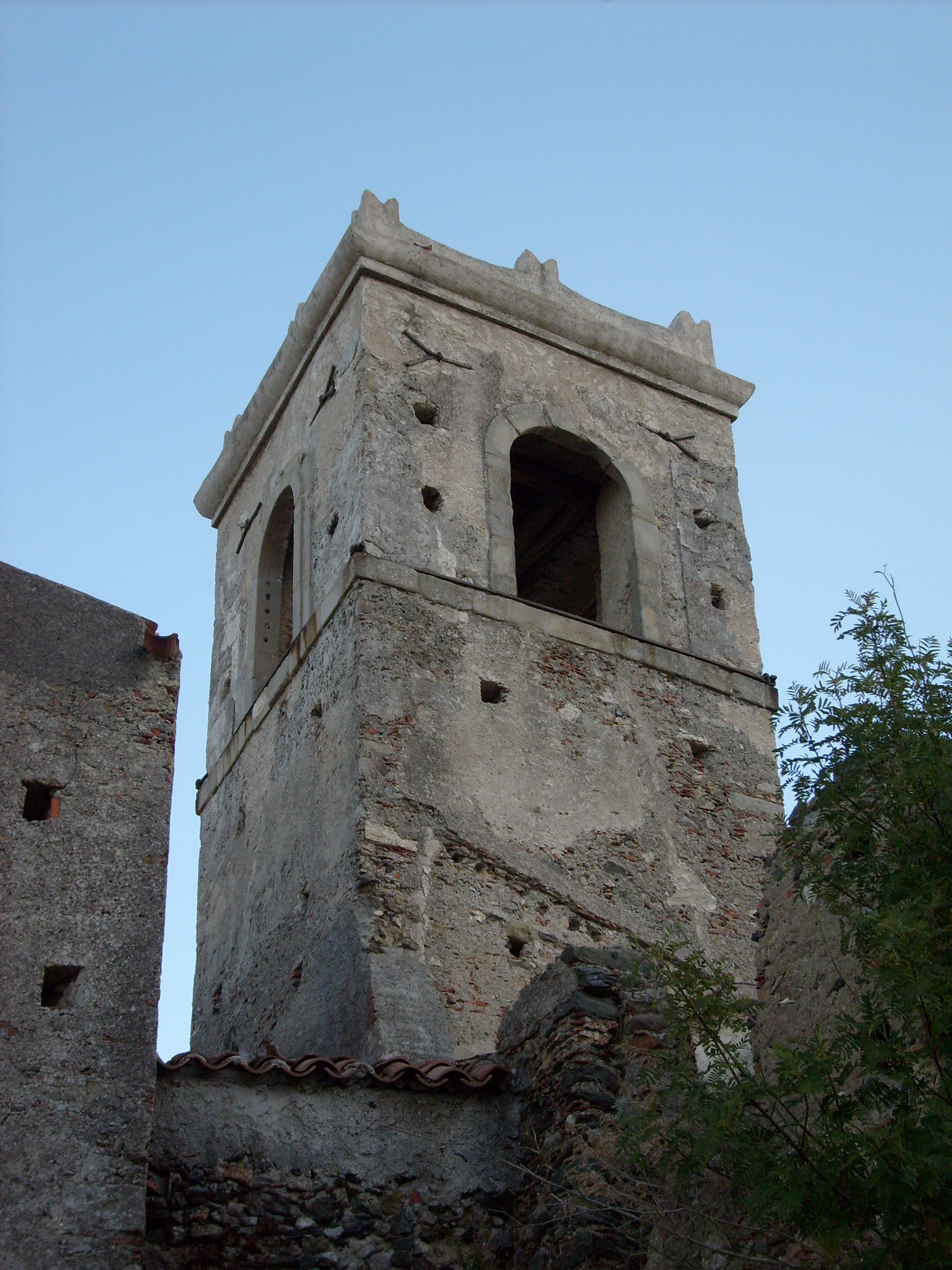 Savoca, Campanile San Michele